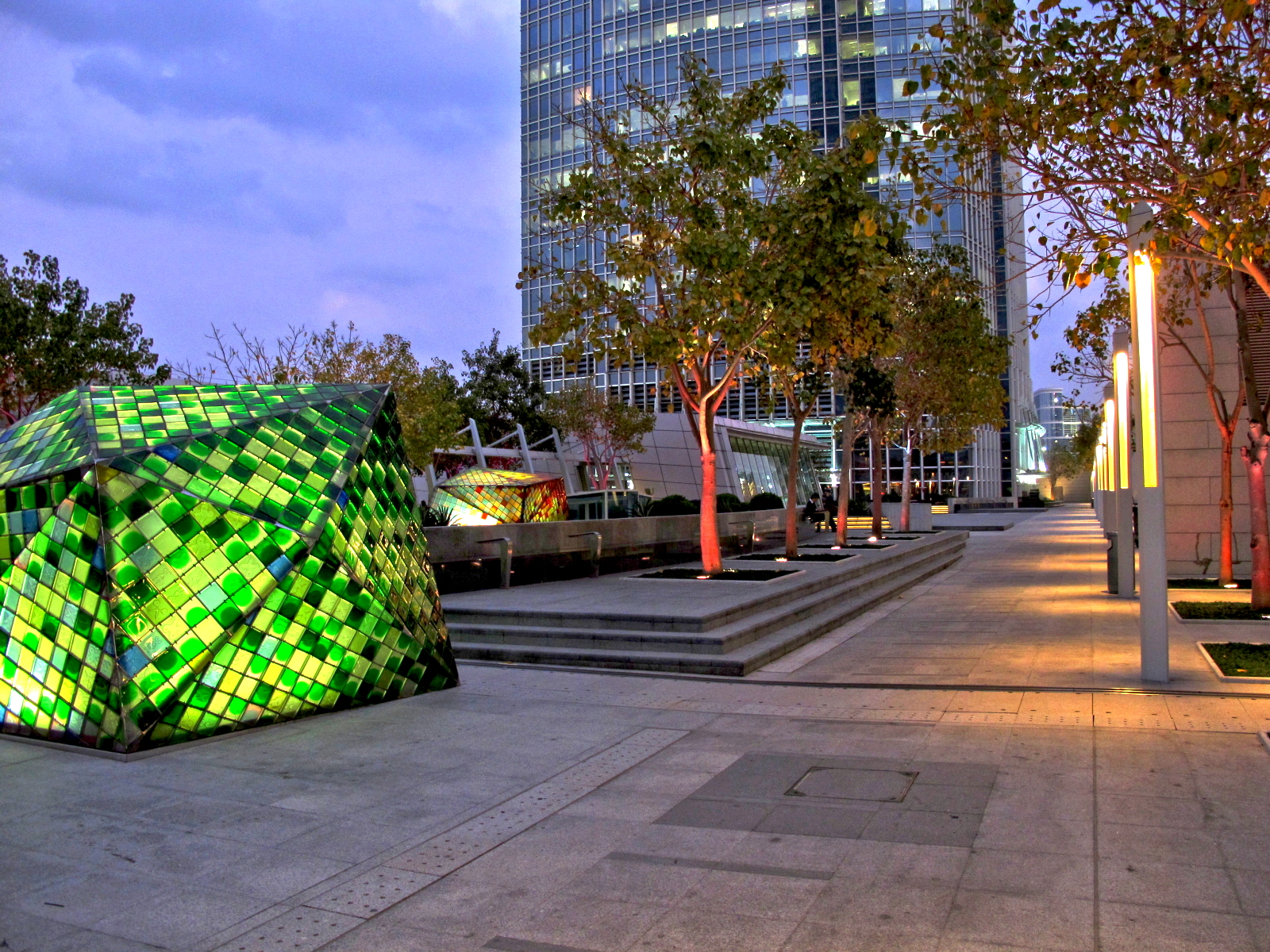 ifc mall Podium Garden